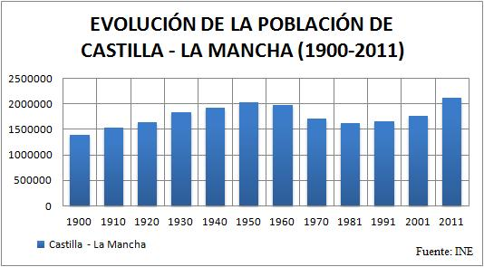 Gráfico de barras con la evolución de la población de Castilla-La Mancha entre 1900 y 2011